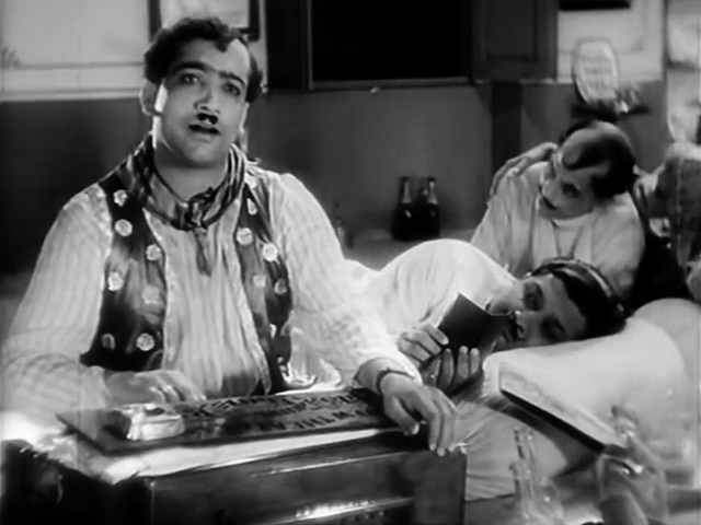 Pahari Sanyal dans Devdas (version hindi) (1935)